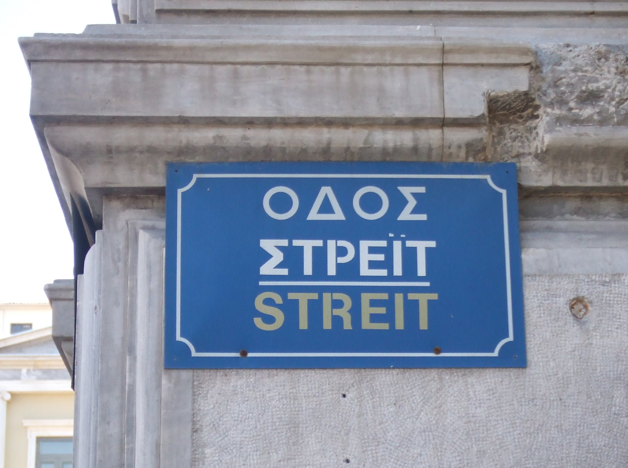 Street sight in Athens "Streit Street" named after Georgios Streit